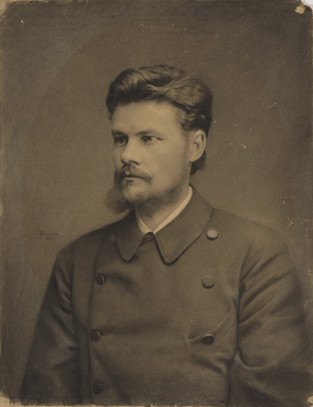 Maalikunstnik Tõnis Grenzsteini teos